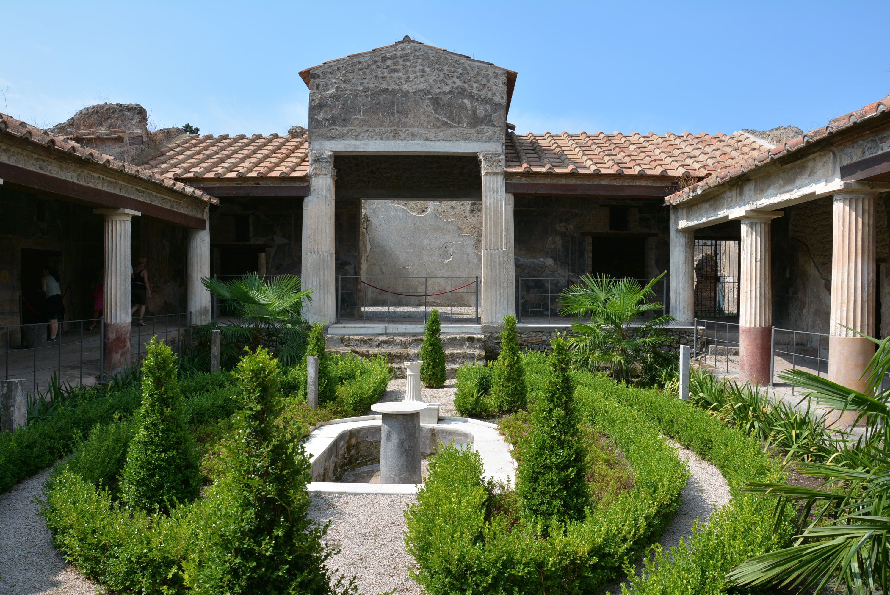 Casa degli Amorini Dorati - MIBACT This is a photo of a monument which is part of cultural heritage of Italy.